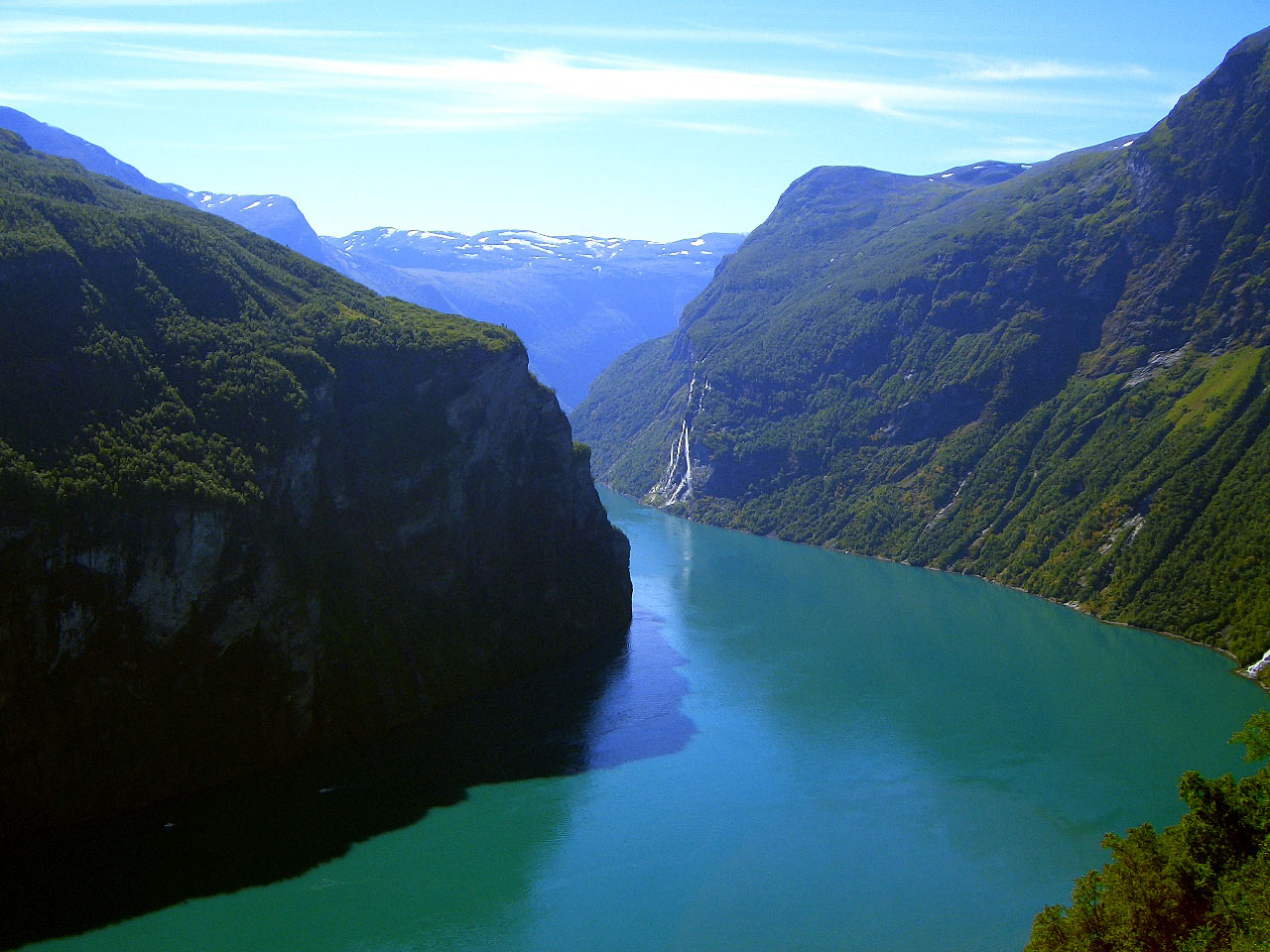 Geiranger fjord.